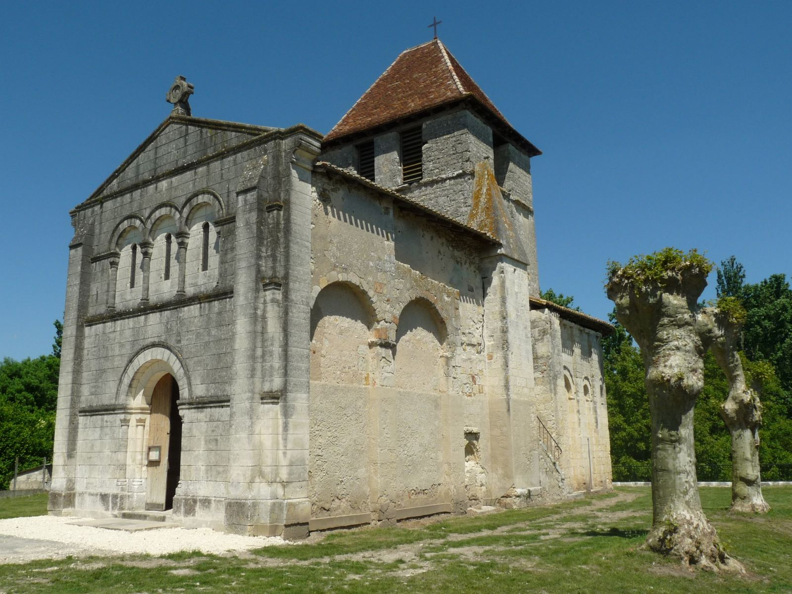 L'église de Chenaud, Dordogne, France